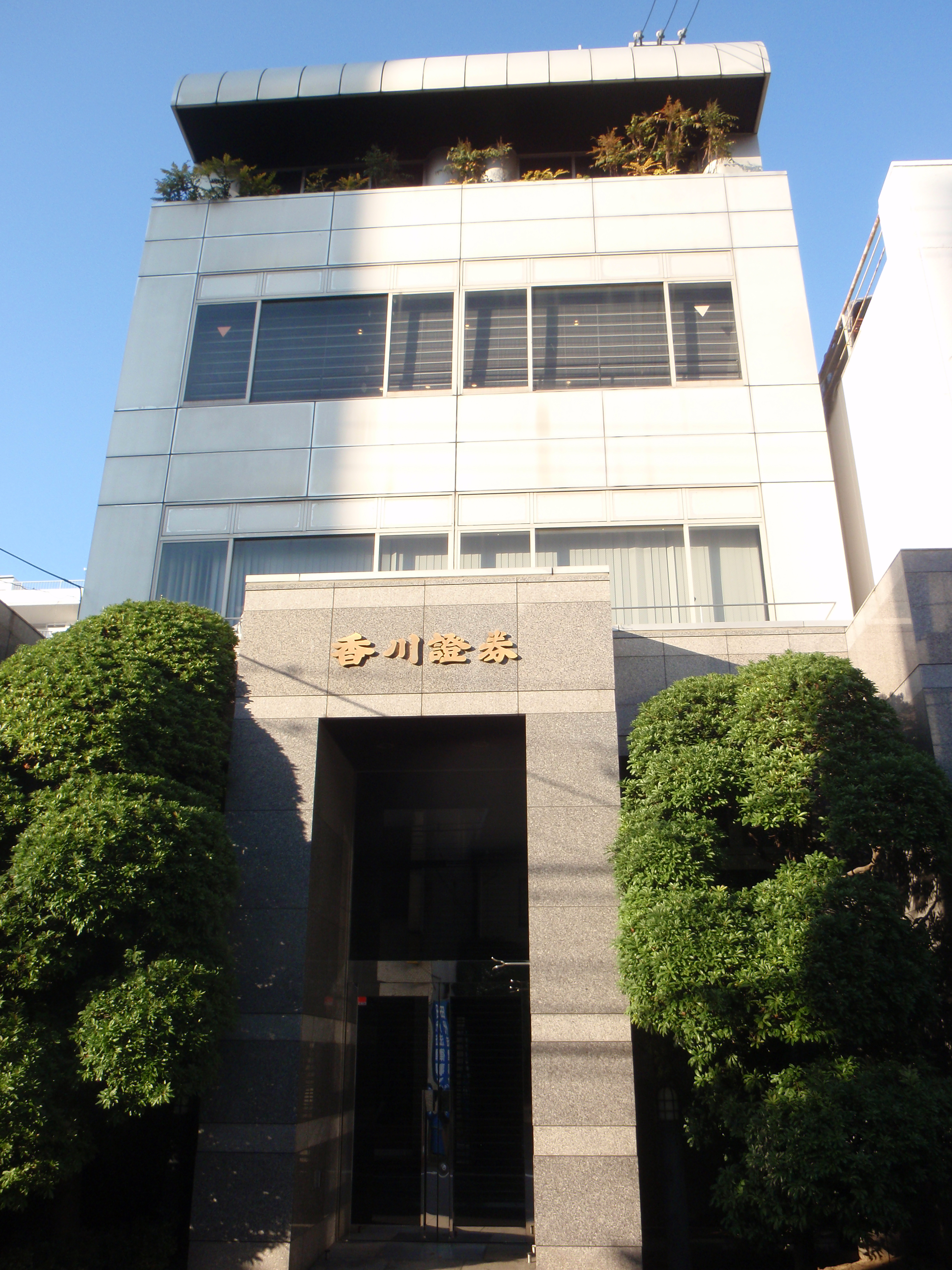 香川県高松市磨屋町にある香川証券の本社ビル。